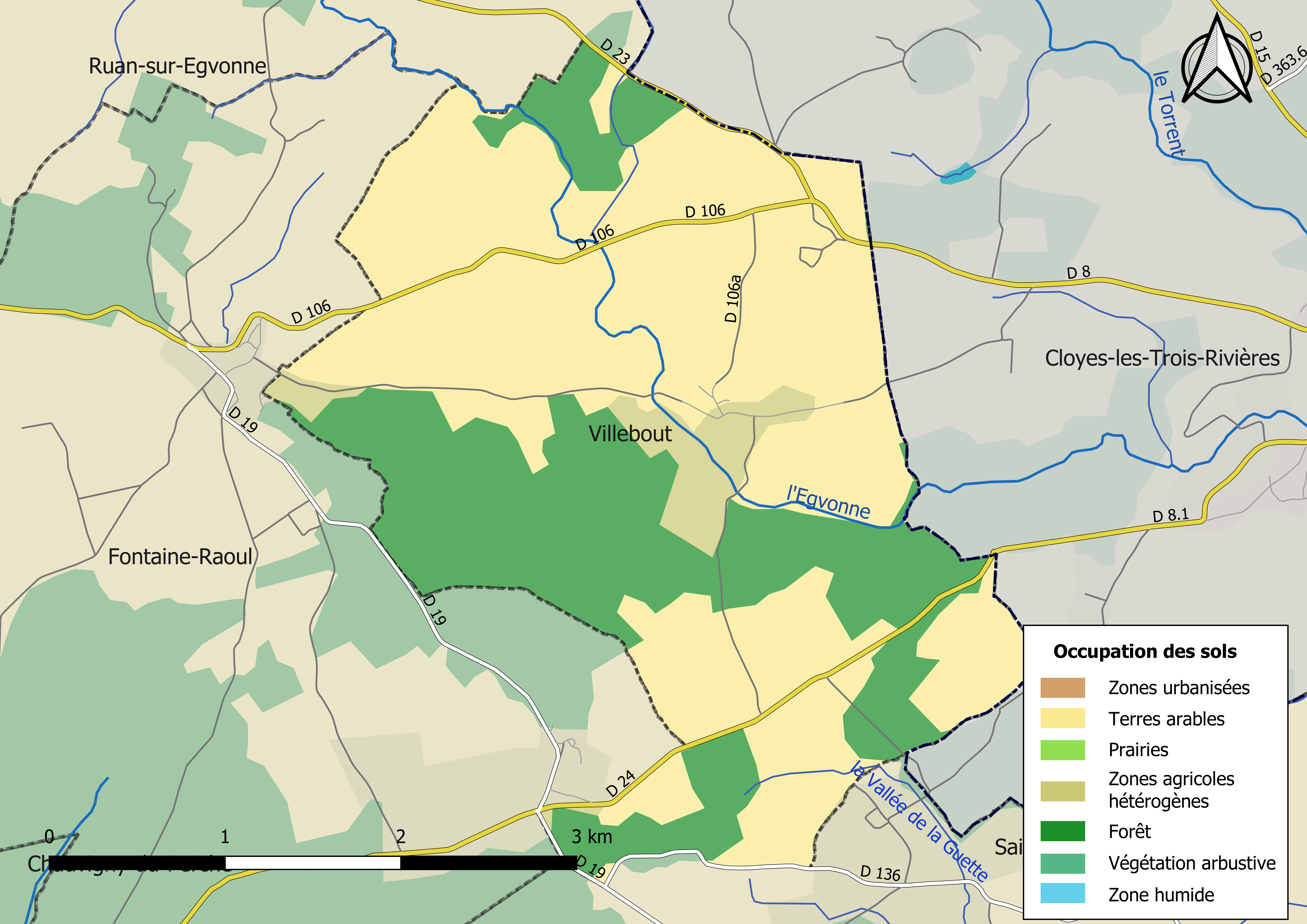 Carte des infrastructures et de l’occupation des sols en 2018 de la commune de Villebout (France).